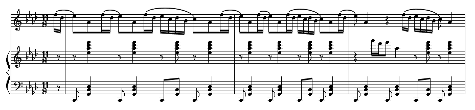 Jean Cras - Suite en duo, premières mesures